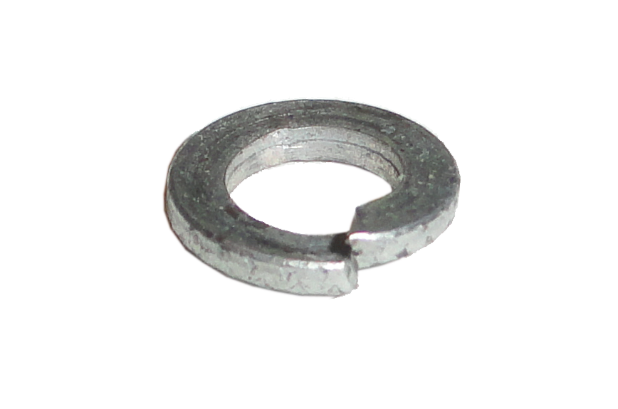 Гровер